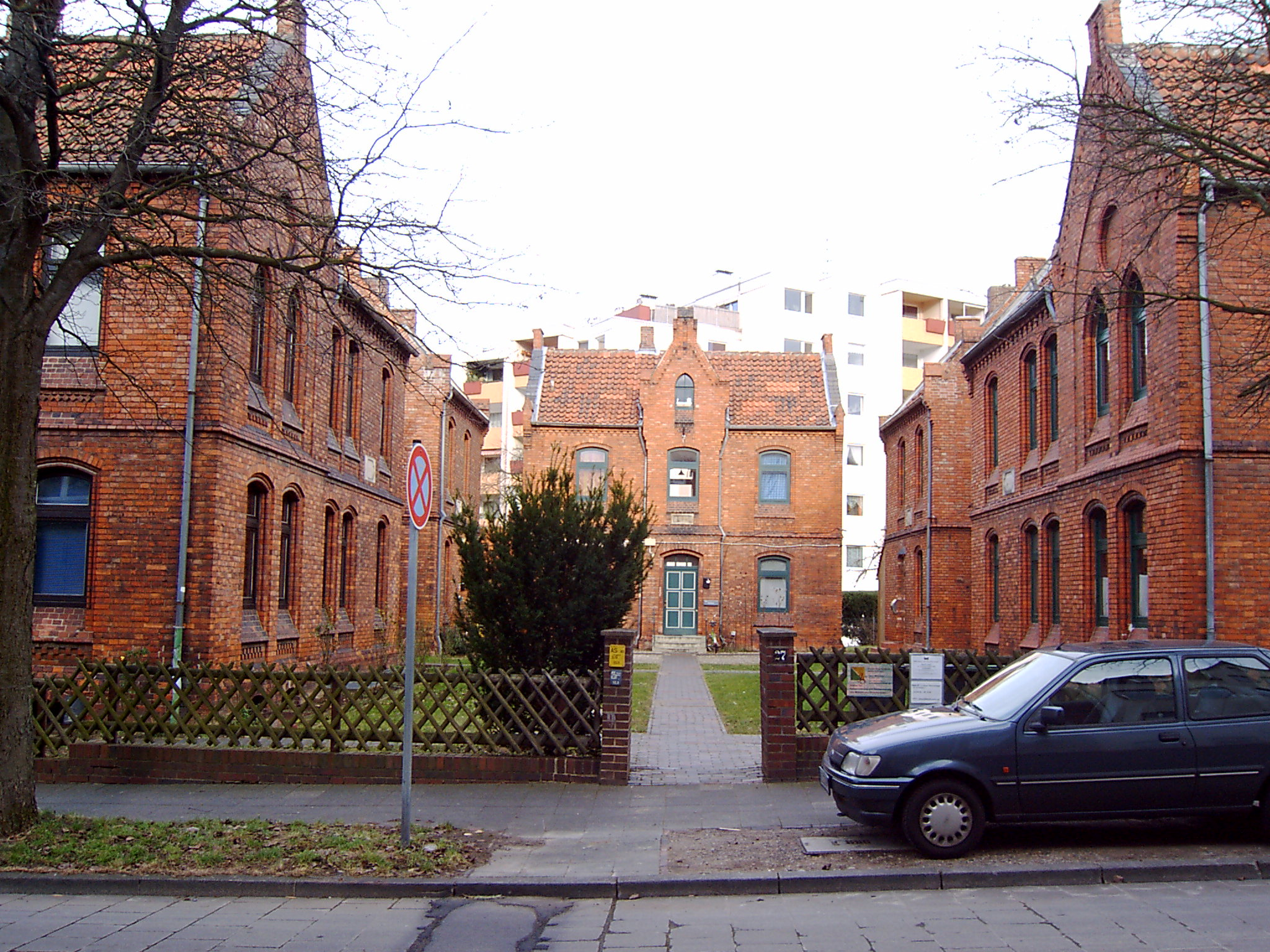 Haus der sieben Brüder am Fuße des Galgenberges in Hildesheim